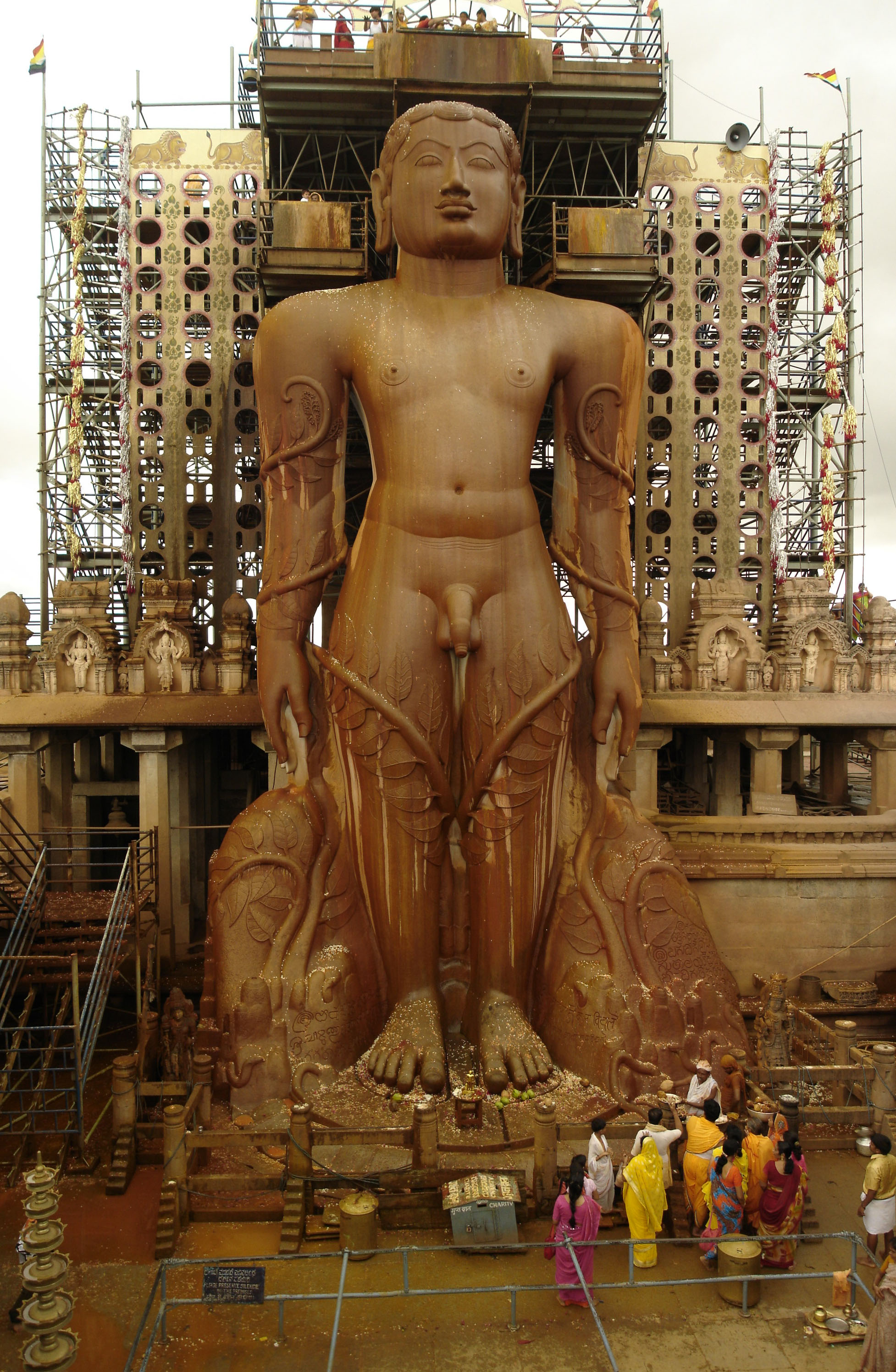 Satue de Gomateshvara, à Shravanabelagola (ville du sud de l'inde)Photo personnelle prise en juin 2006. Statue considérée par certains comme le plus grand monolithe taillé du monde.